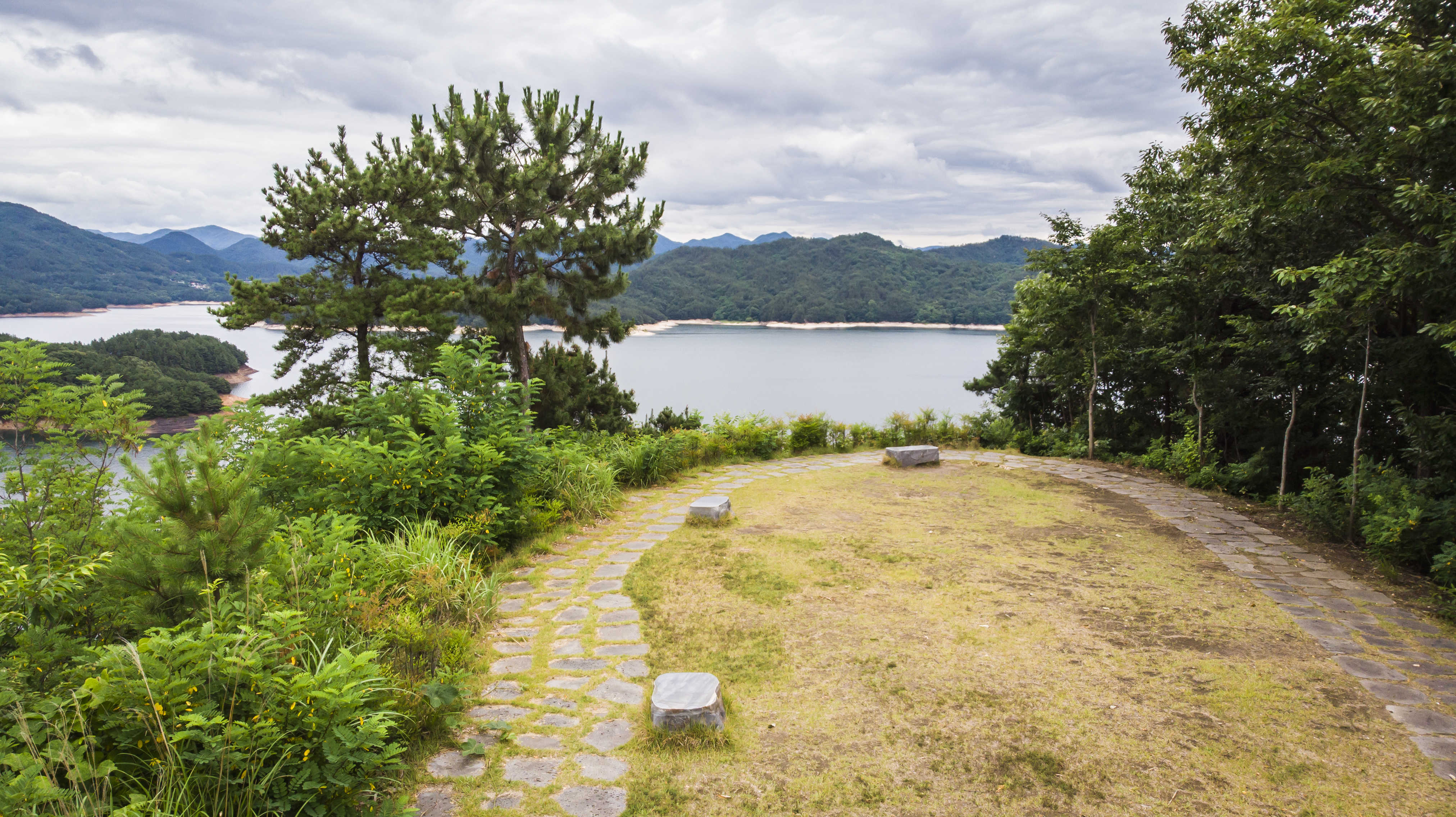 대청호오백리길 3구간_4